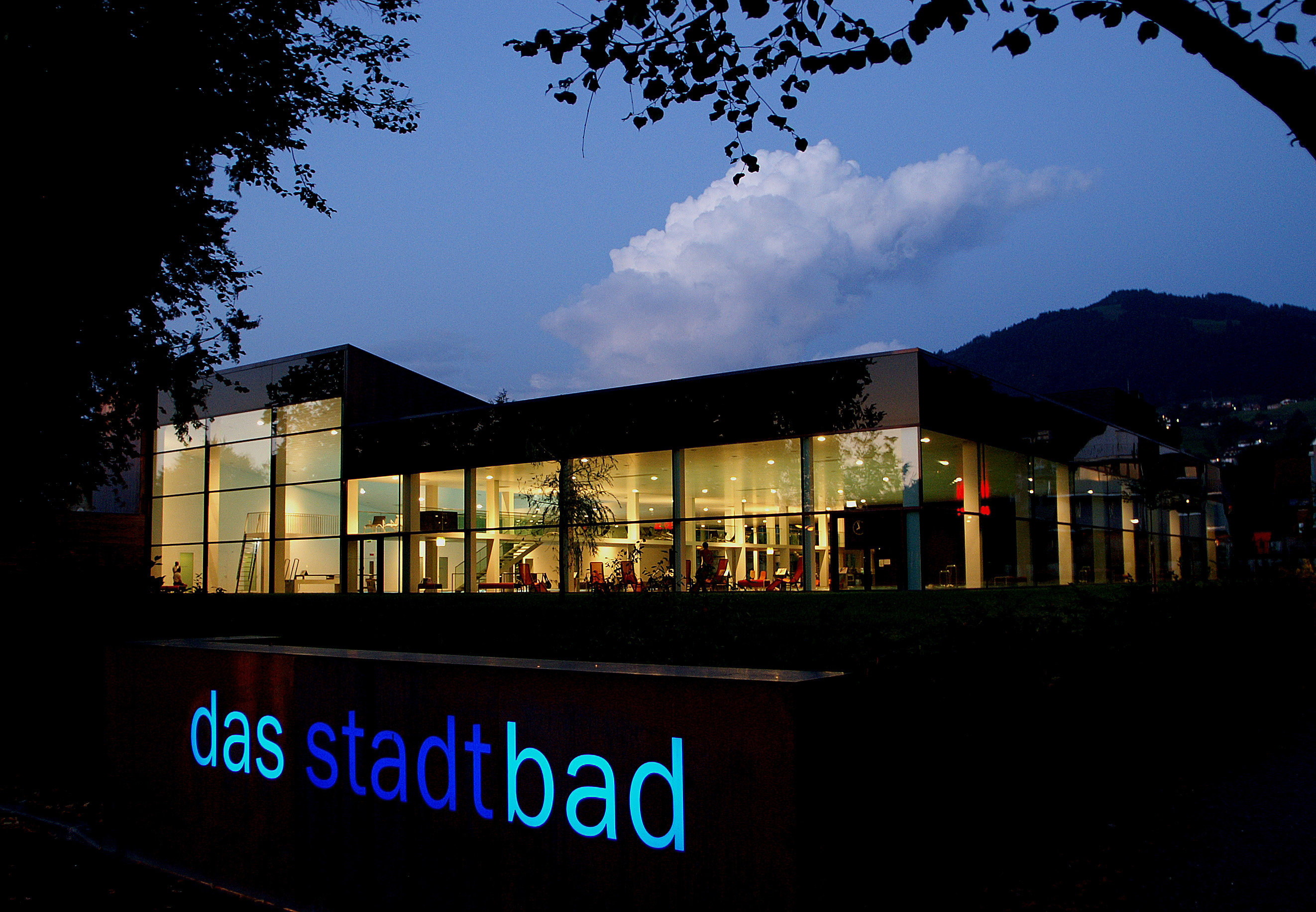 das Stadt Bad in Dornbirn, nach Plänen von cukrowicz nachbaur architekten zt gmbh.